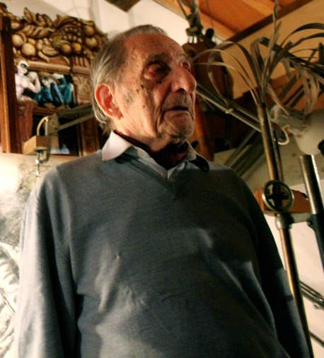 Foto di Ferdinando Ghelli